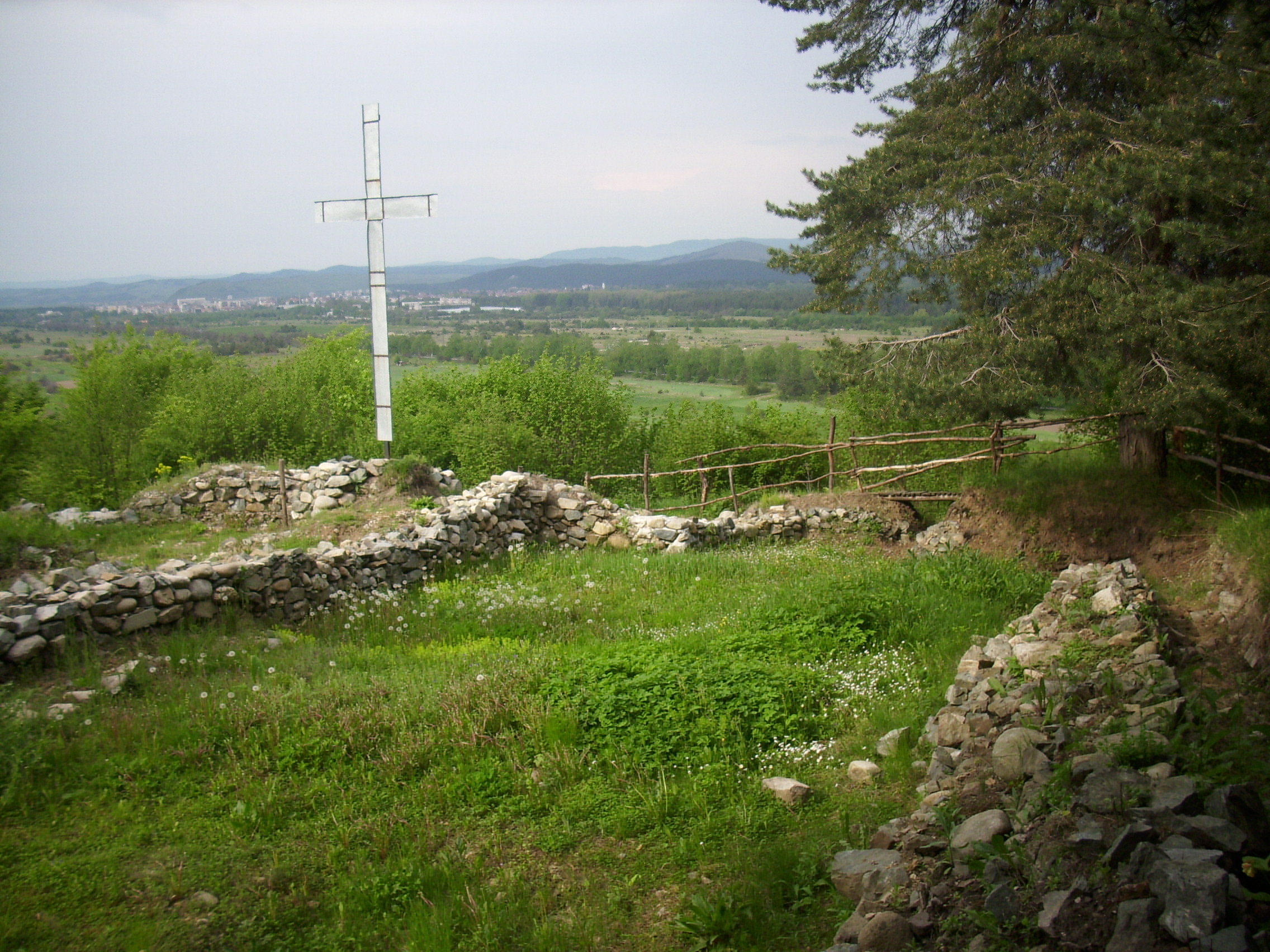 Tzar Shishman of Bulgaria fortress - Samokov